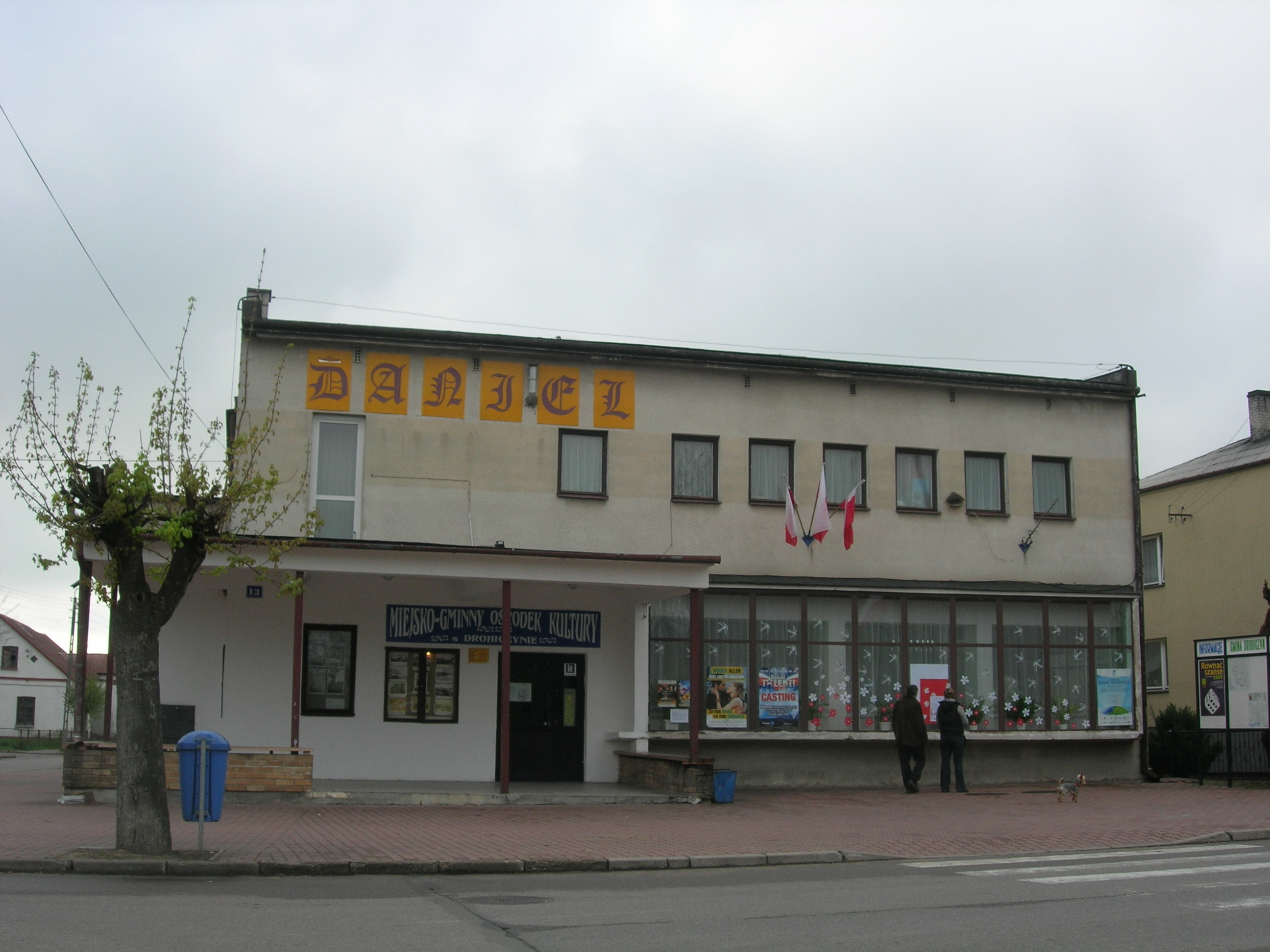 kino w Drohiczynie. Nazwa Daniel na cześć aktora Daniela Olbrychskiego, mieszkańca tego miasta.